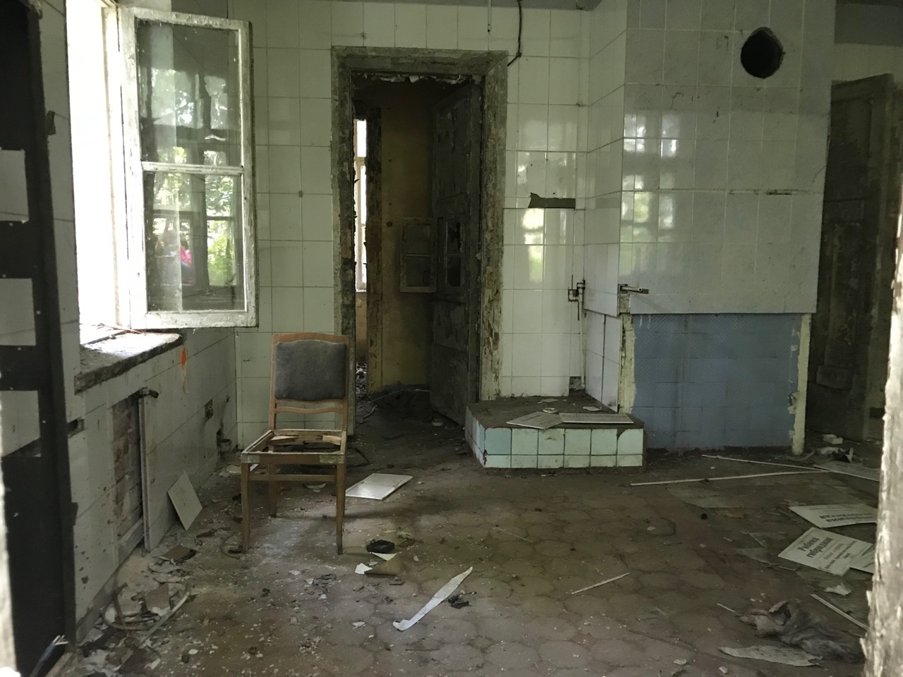 Интерьер противотуберкулезного диспансера в Родниках